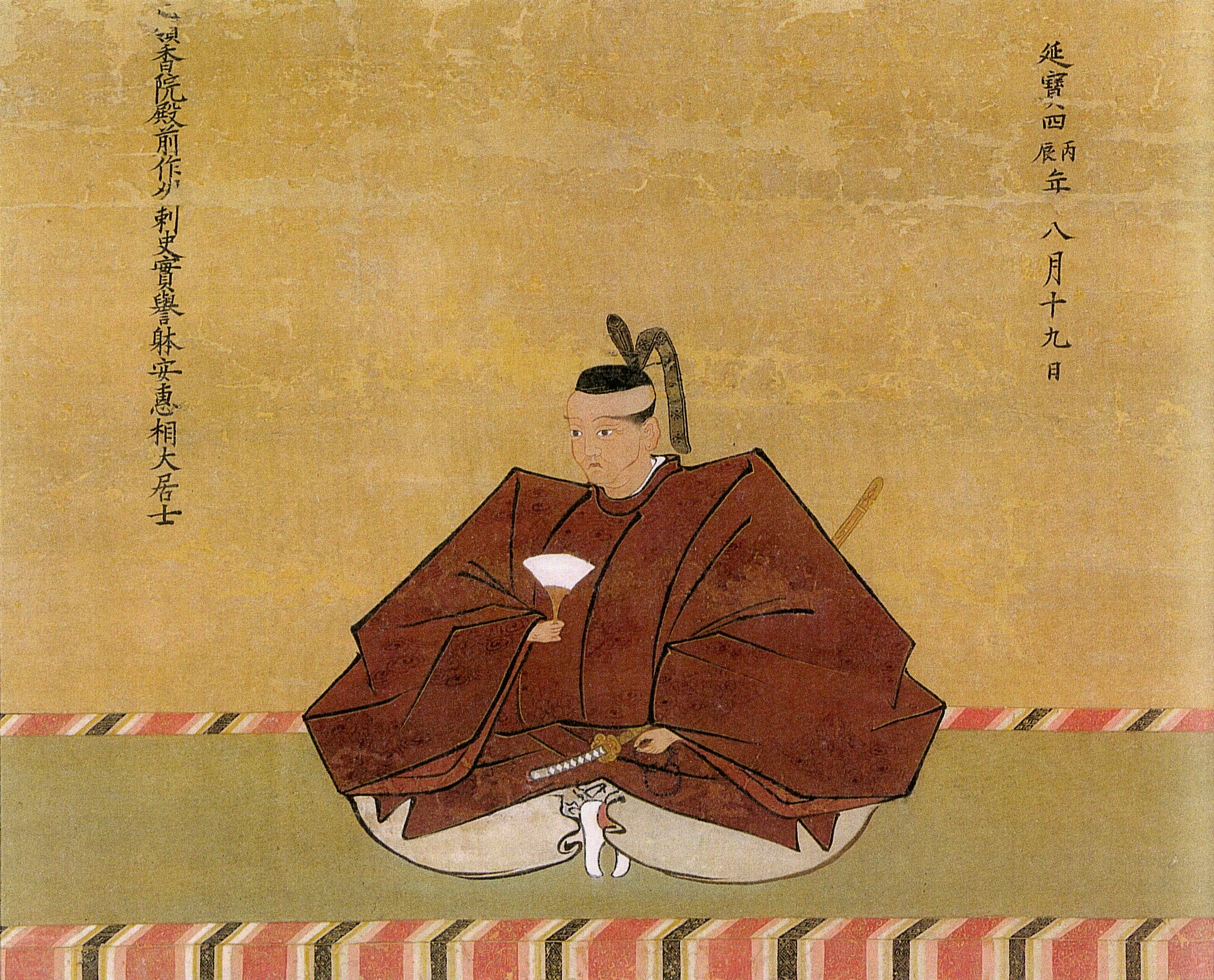 松平定時の肖像。